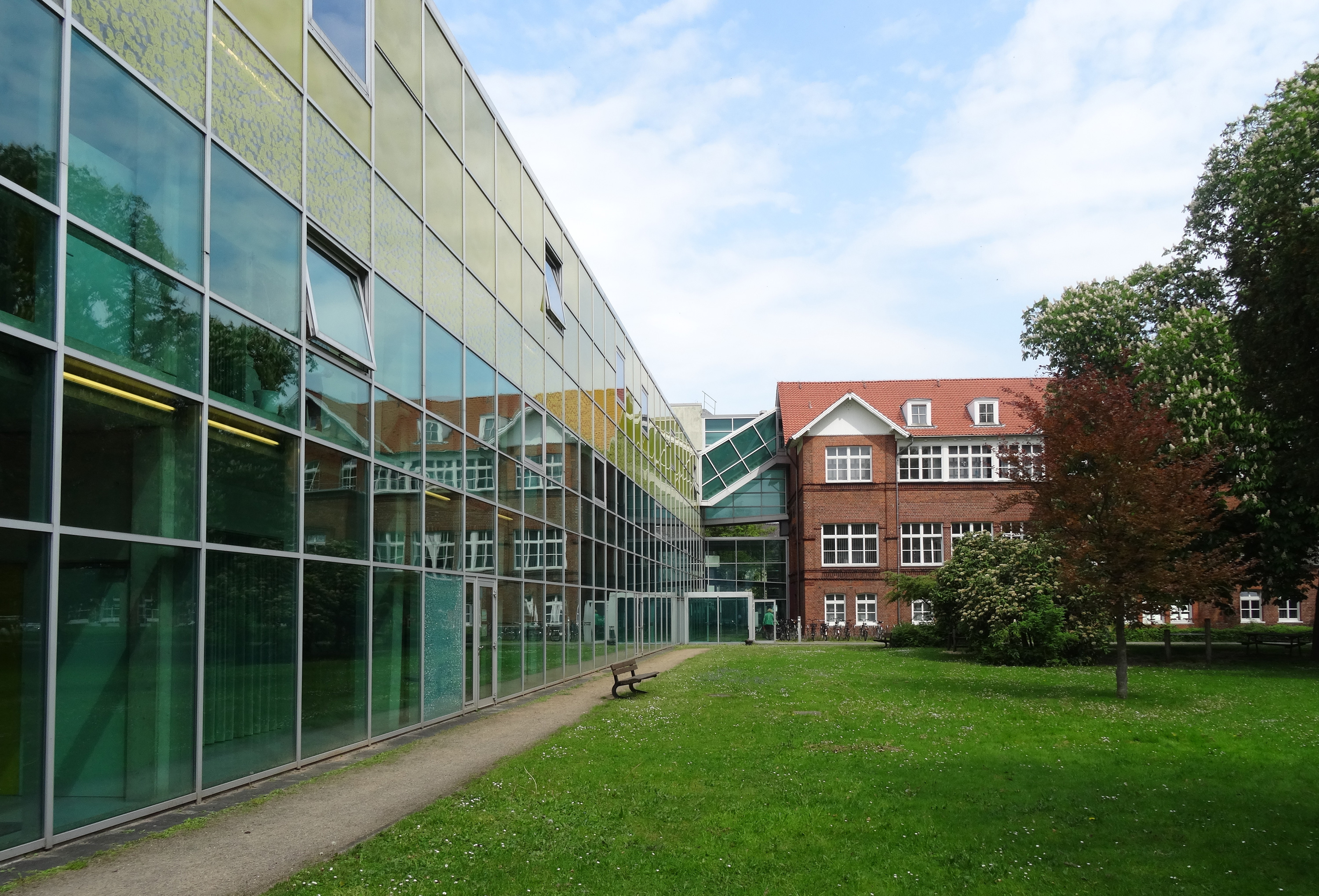 Erweiterungsbau Gesundheitsamt Bremen, Östliche Vorstadt. Das Gebäude gehört zu den bedeutenden Bremer Bauwerken. Rechts das dreigeschossige Ansgarhaus von 1882